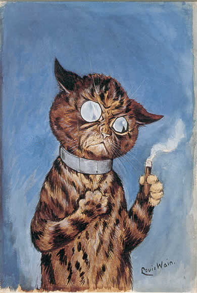 Gato fumando um cigarro